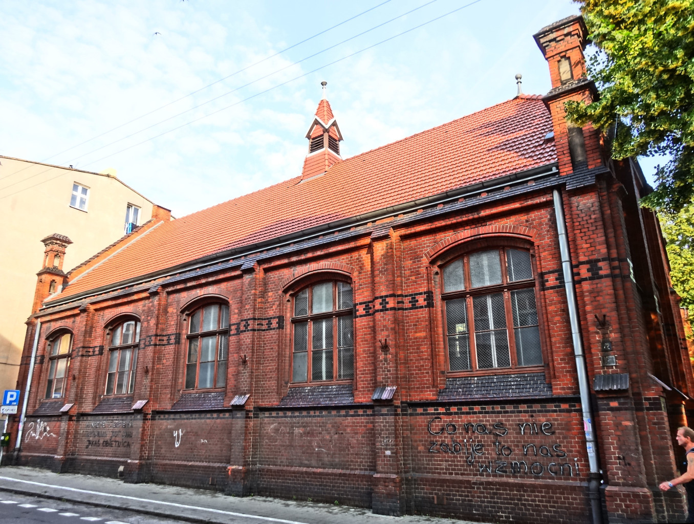 Bydgoszcz u.l Kordeckiego 22 - sala gimnastyczna zbud. 1900-1902 (zabytek należy obecnie do Uniwersytetu Technologiczno Przyrodniczego wpisany do rej woj. Kuj. - Pom.)